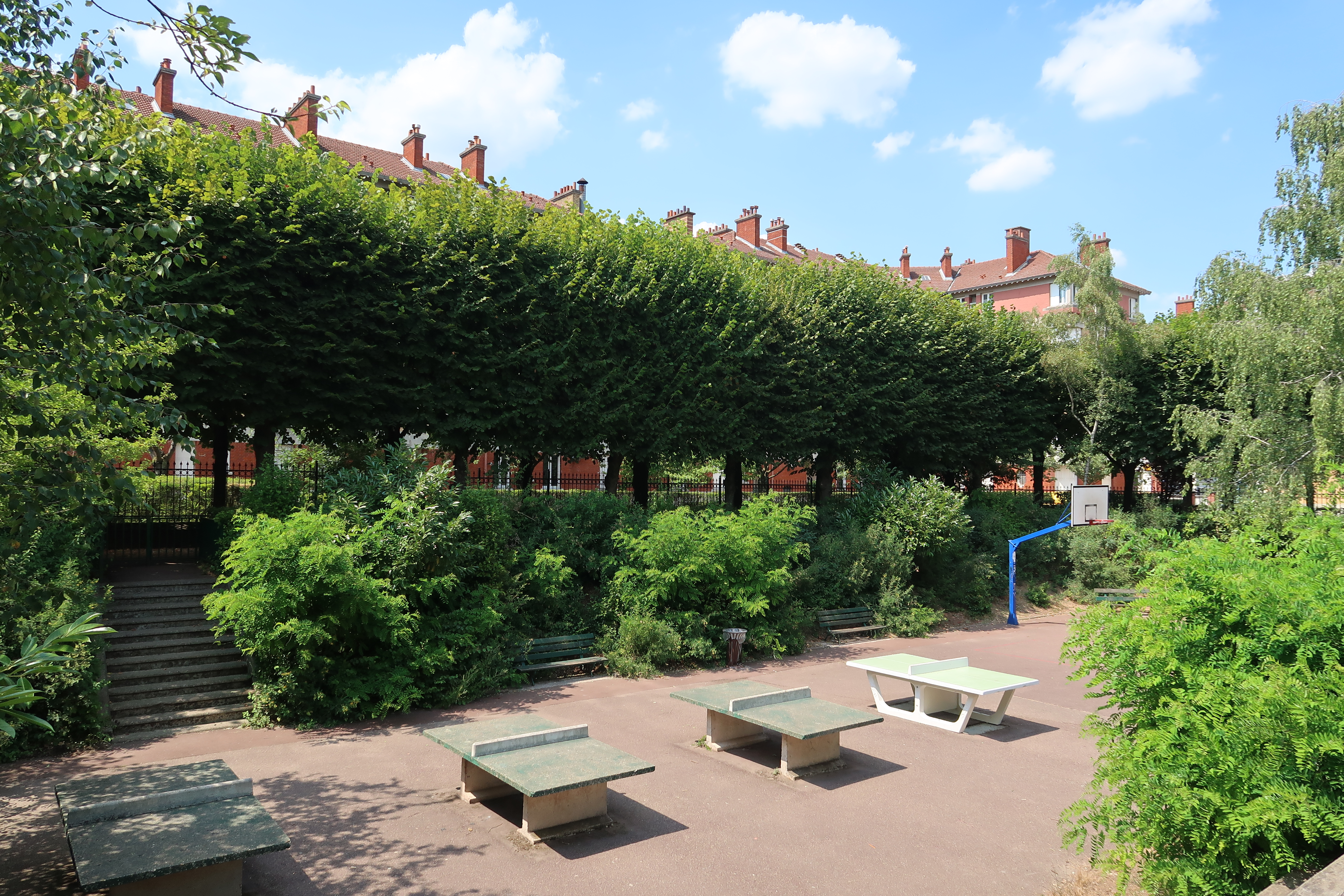 Terrains de tennis de table dans le square Léon-Bourgeois à Suresnes (Hauts-de-Seine).